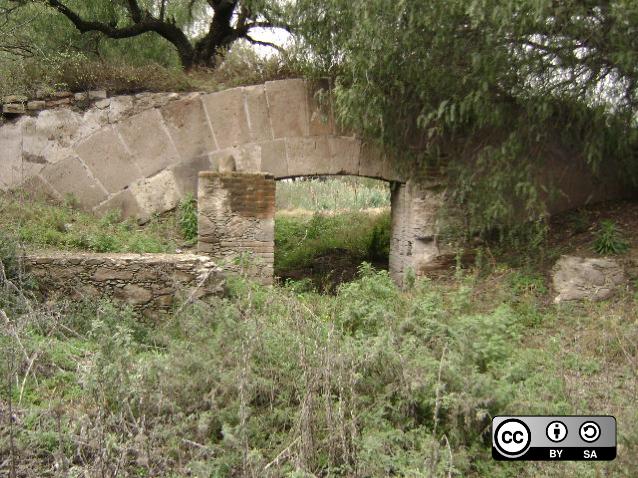 La fotografía corresponde al "Puente de Piedra" o "Puente de Piedra" localizado en San Nicolás, Tequisquiapan, Querétaro, México. Presuntamente trazado por Fray Sebastián de Aparicio. Con una antigüedad aproximada de 450 años (2010).